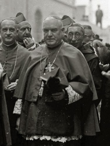 Título original: Peregrinación española al XXX Congreso Eucarístico Internacional en Cartago (25/26) Localización: Guipúzcoa